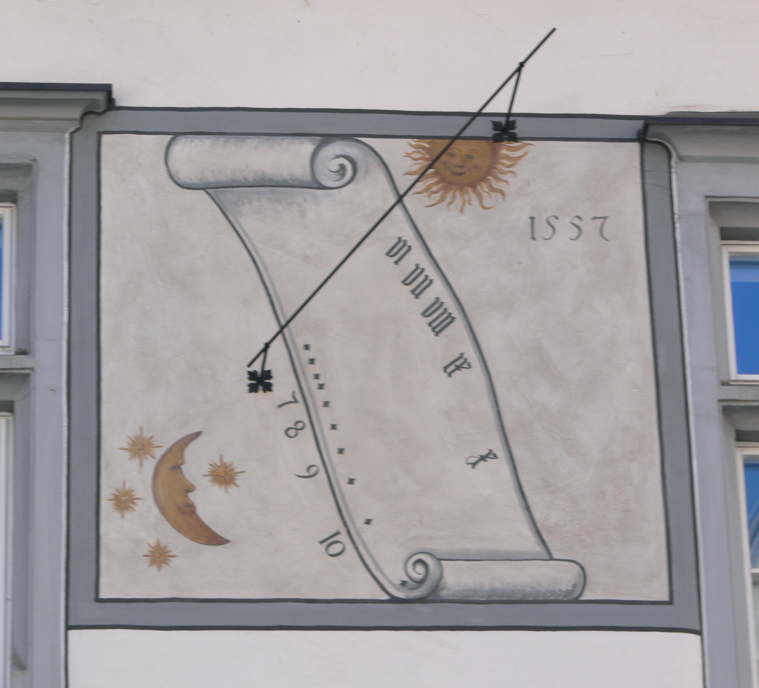 Ravensburg Waaghaus, Sonnenuhr